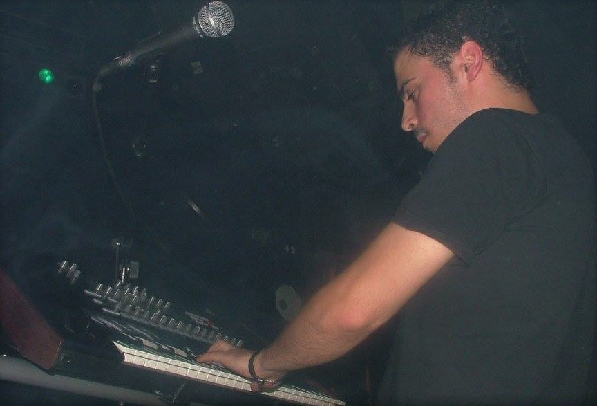 Jorge Vila Teclista.